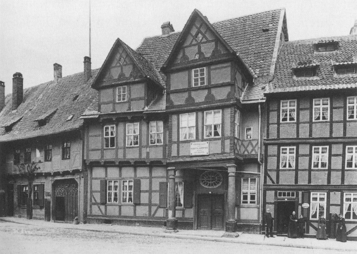 Klopstockhaus, Schloßberg 12, Quedlinburg um 1900